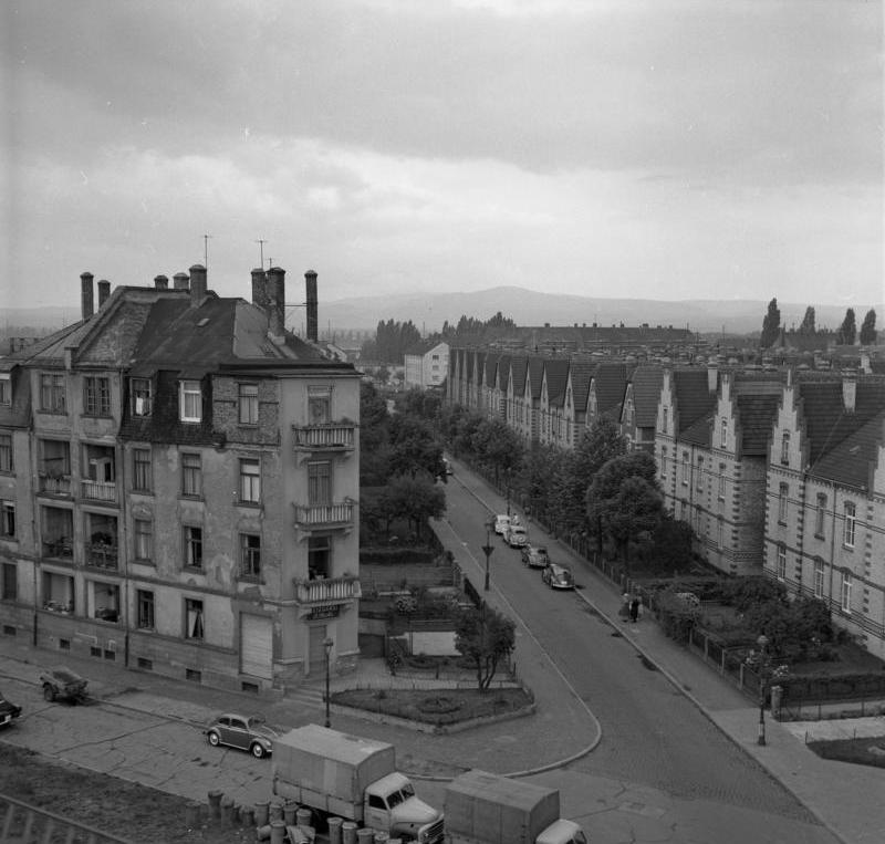 Stadtaufnahmen Frankfurt/Main-Gallus